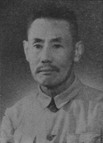 中文（台灣）: 中國人民政治協商會議第一屆全體會議代表